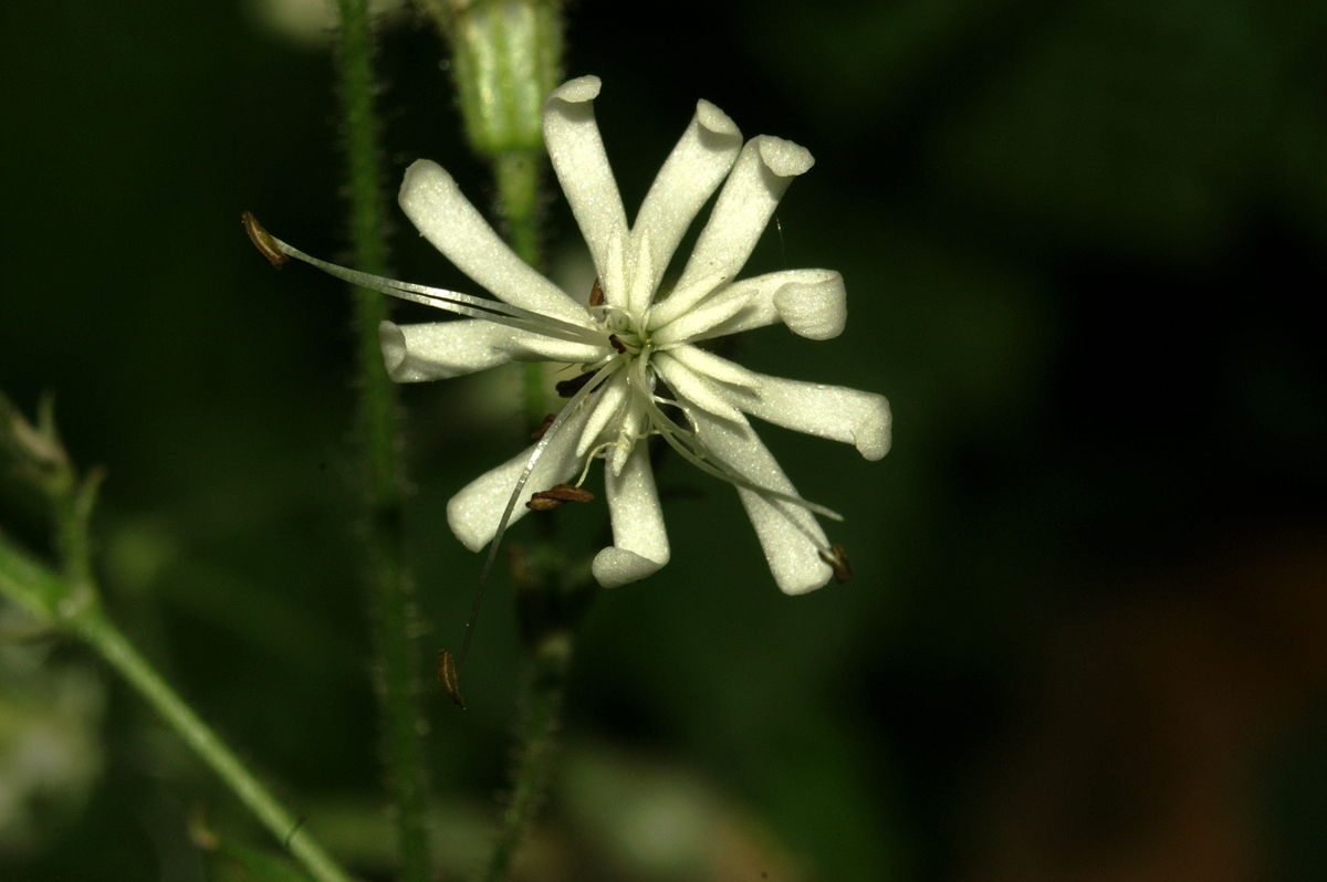 Kimasta lepnica v Polhovem Gradcu